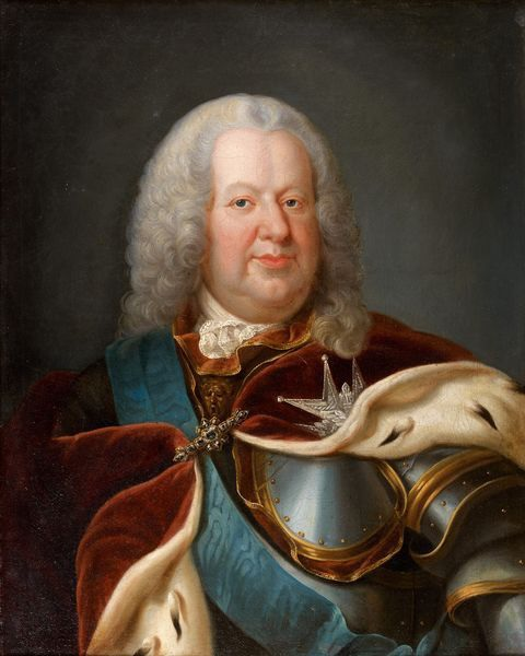 Portrait de Stanislas Leszczynski en buste